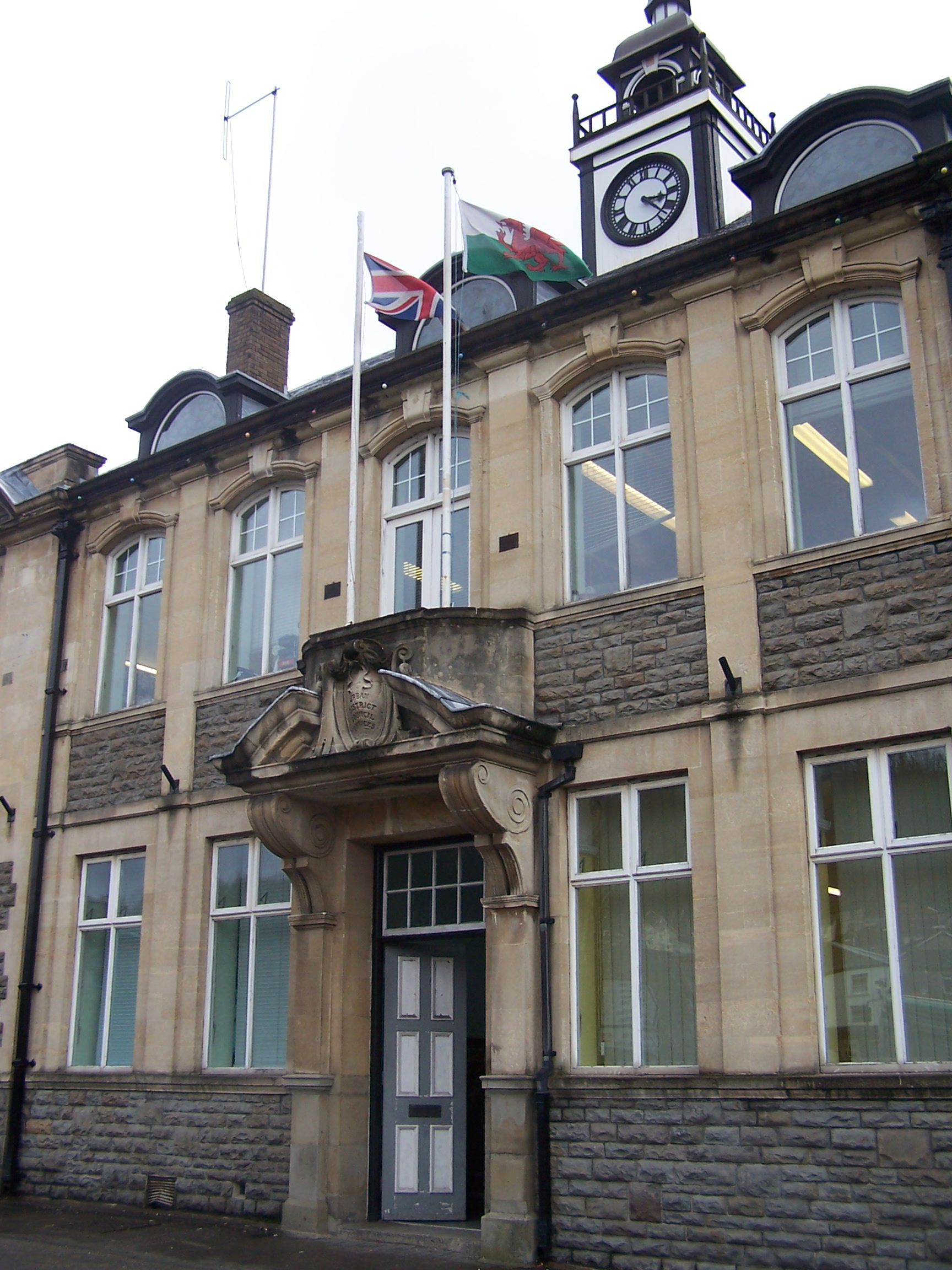 Mountain Ash Town Hall, Rhondda Cynon Taf